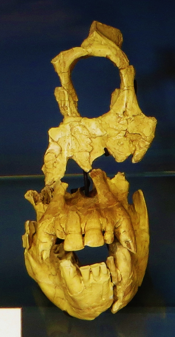 Fossil of Sivapithecus, an extinct mammal - Took the photo at Musee d'Histoire Naturelle, Paris